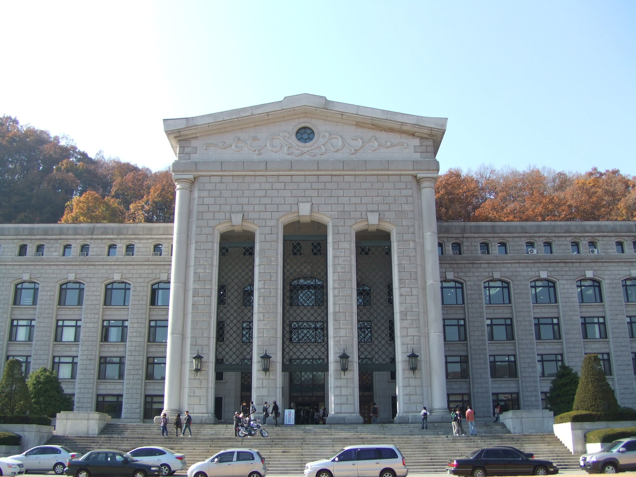 천안캔퍼스 본관